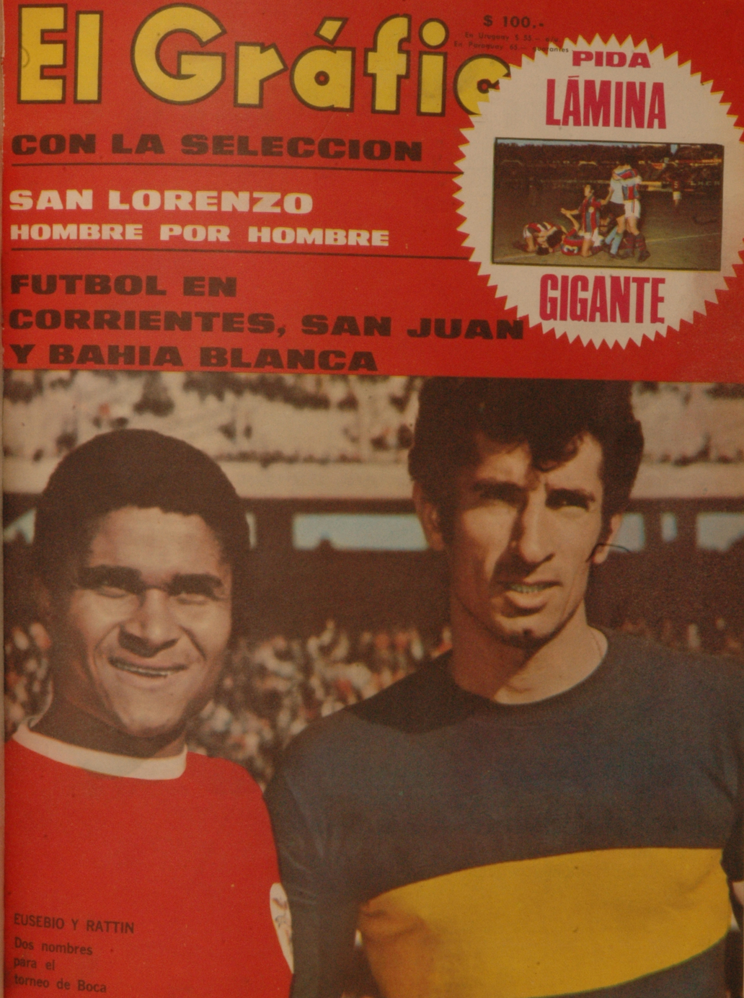 El Grafico del 13 de Agosto de 1968. Edicion 2549